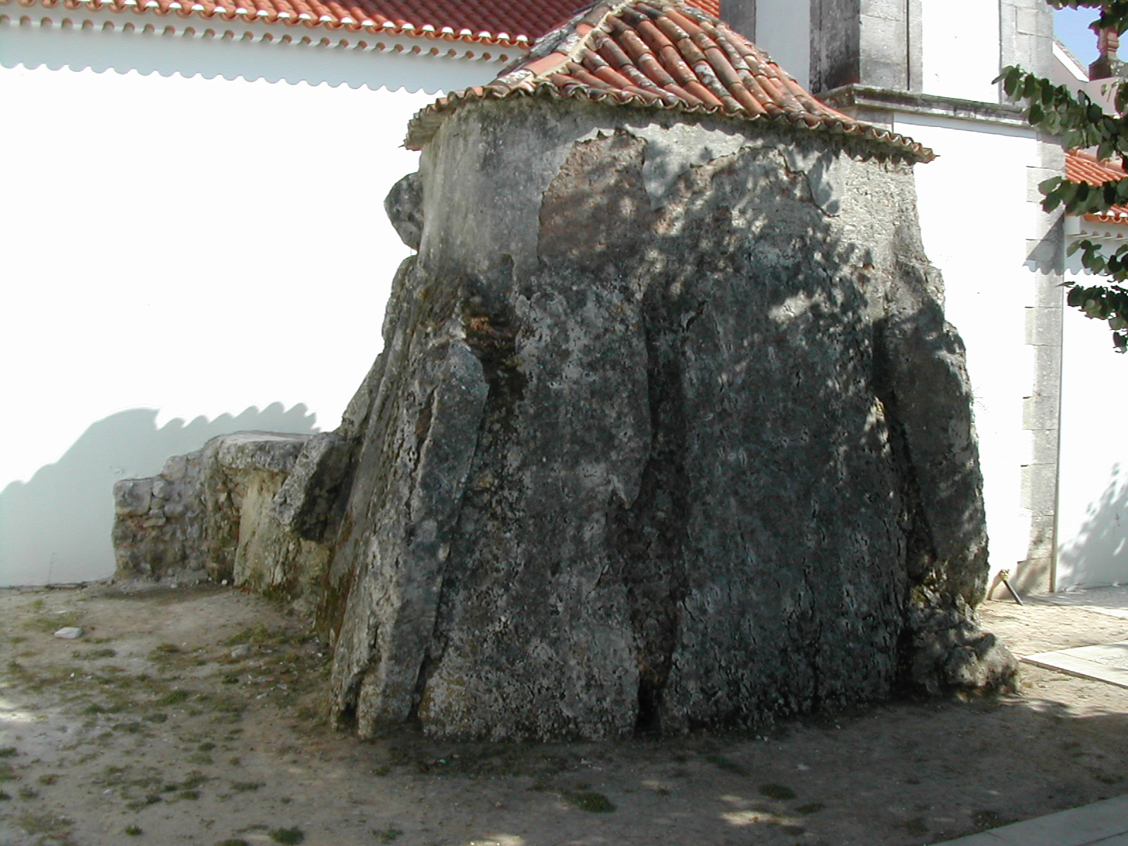 Igreja de Santa Maria Madalena (Alcobertas) ou Igreja Paroquial de Alcobertas, e megálito-capela adjacente, Rio Maior, Portugal.